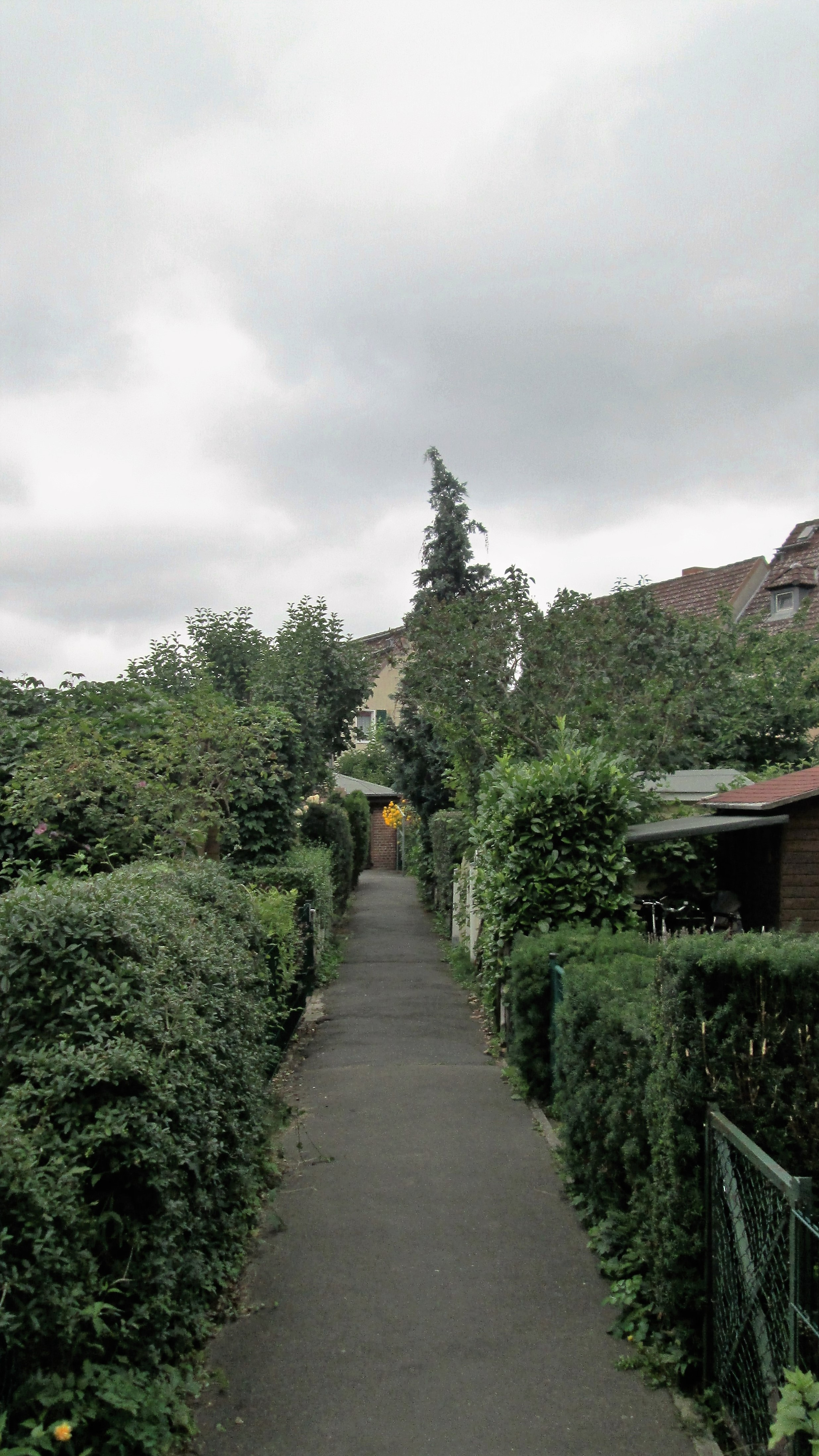 Waldsiedlung Hakenfelde, Weg vom Tannenweg zum Eschenweg, Berlin-Spandau